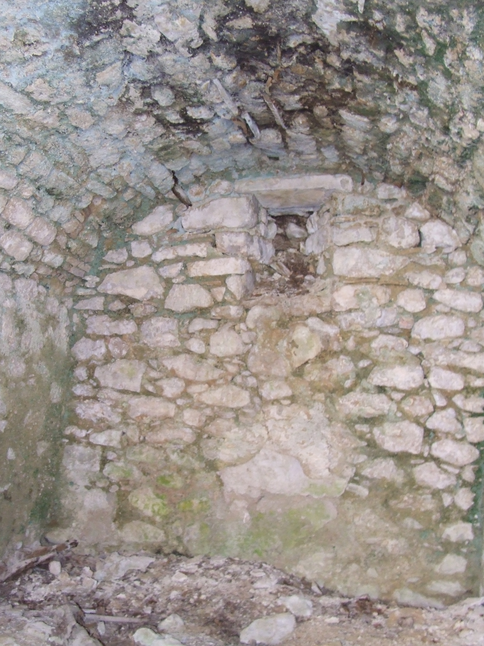 Sant Martí de Vilanoveta (Hortoneda de la Conca, Conca de Dalt, Pallars Jussà)